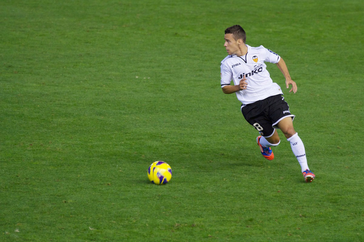 Valencia CF - Español 2012 #38